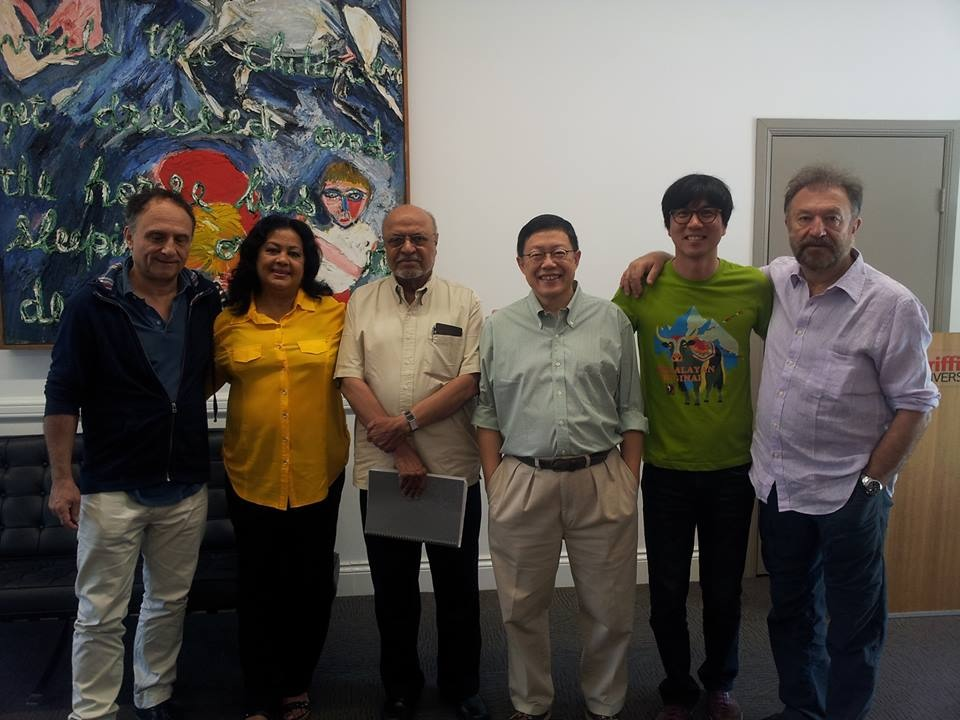 Türk Jüri Üyesi Tamer Levent 7.Asya Pasifik Sinema Akademi ödülleri (APSA) Jüri Üyeleri ile